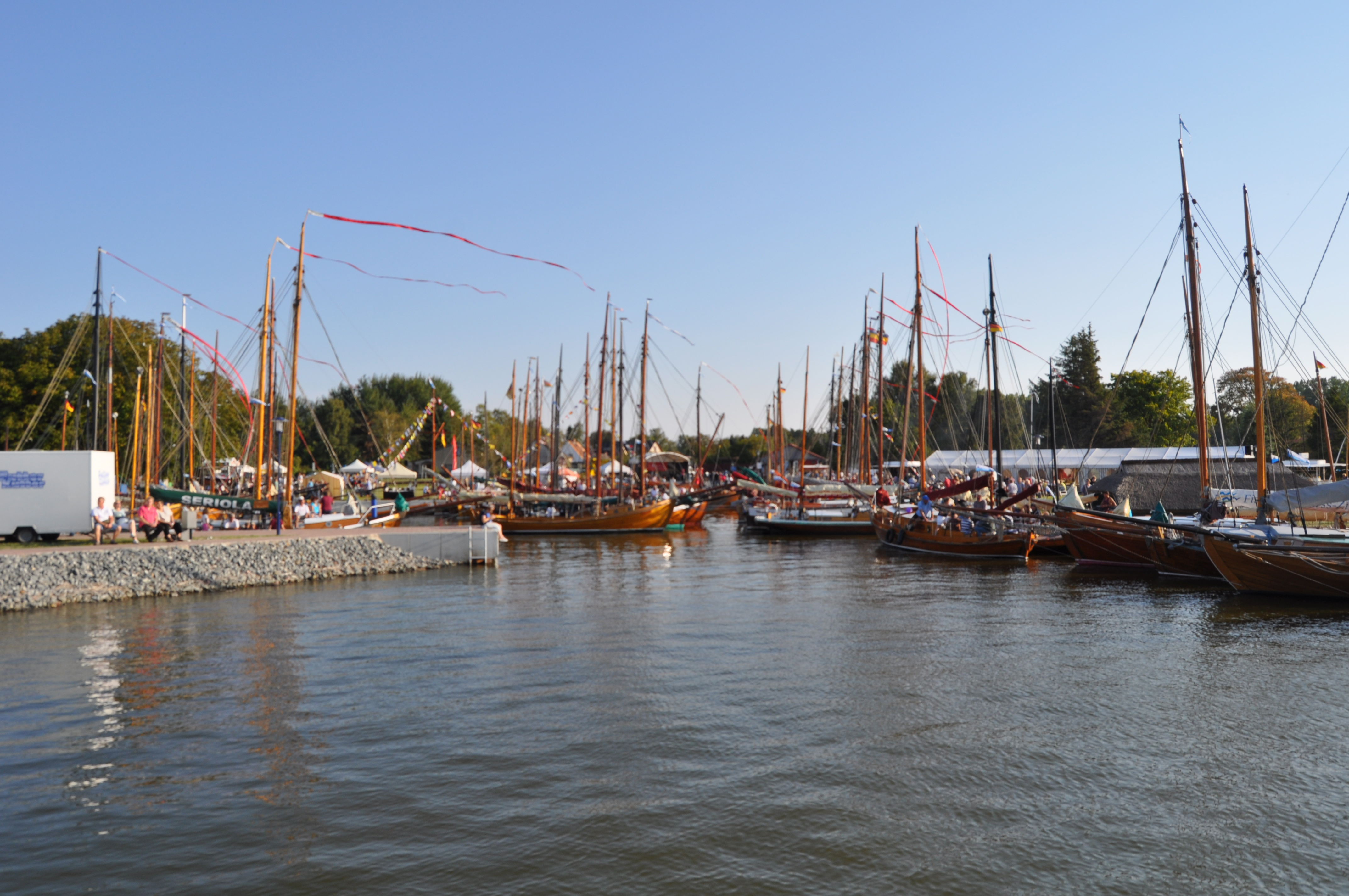 Die Boote nach der Regatta mit Teilnehmerwimpel (oben)